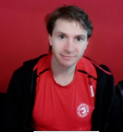 Po zakončení sezóny 2016/17 na autogramiádě ve Werk Areně